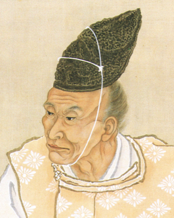 岸駒自画像（部分） 絹本着色